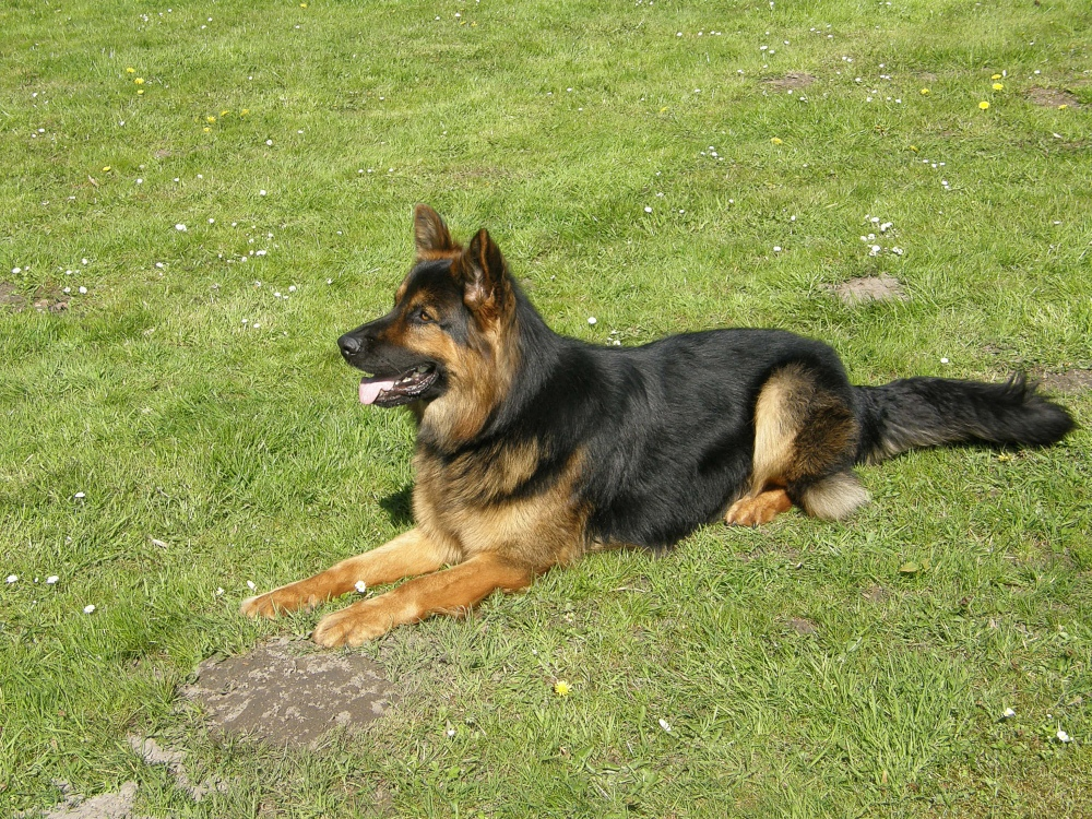 Pico, ein Altdeutscher Schäferhund † Mai 2010